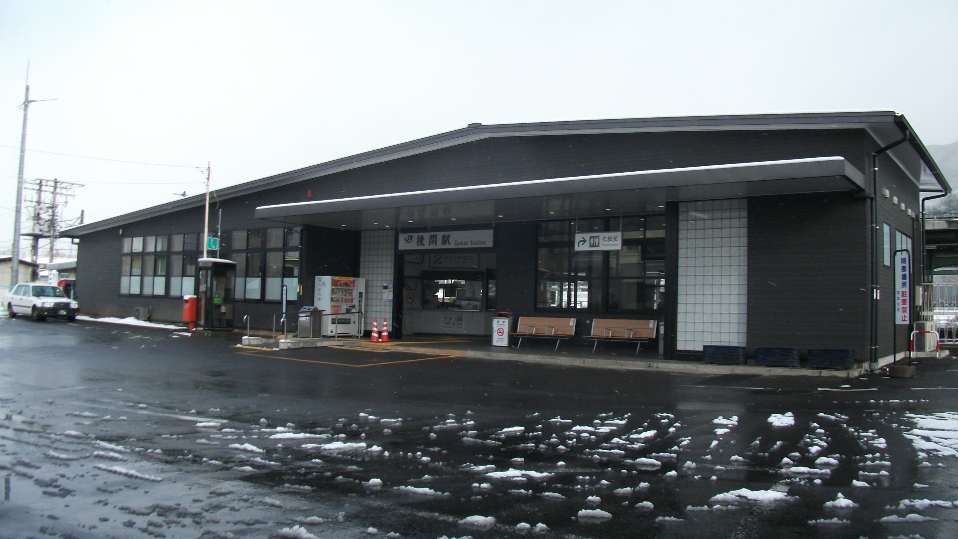 JR後閑駅